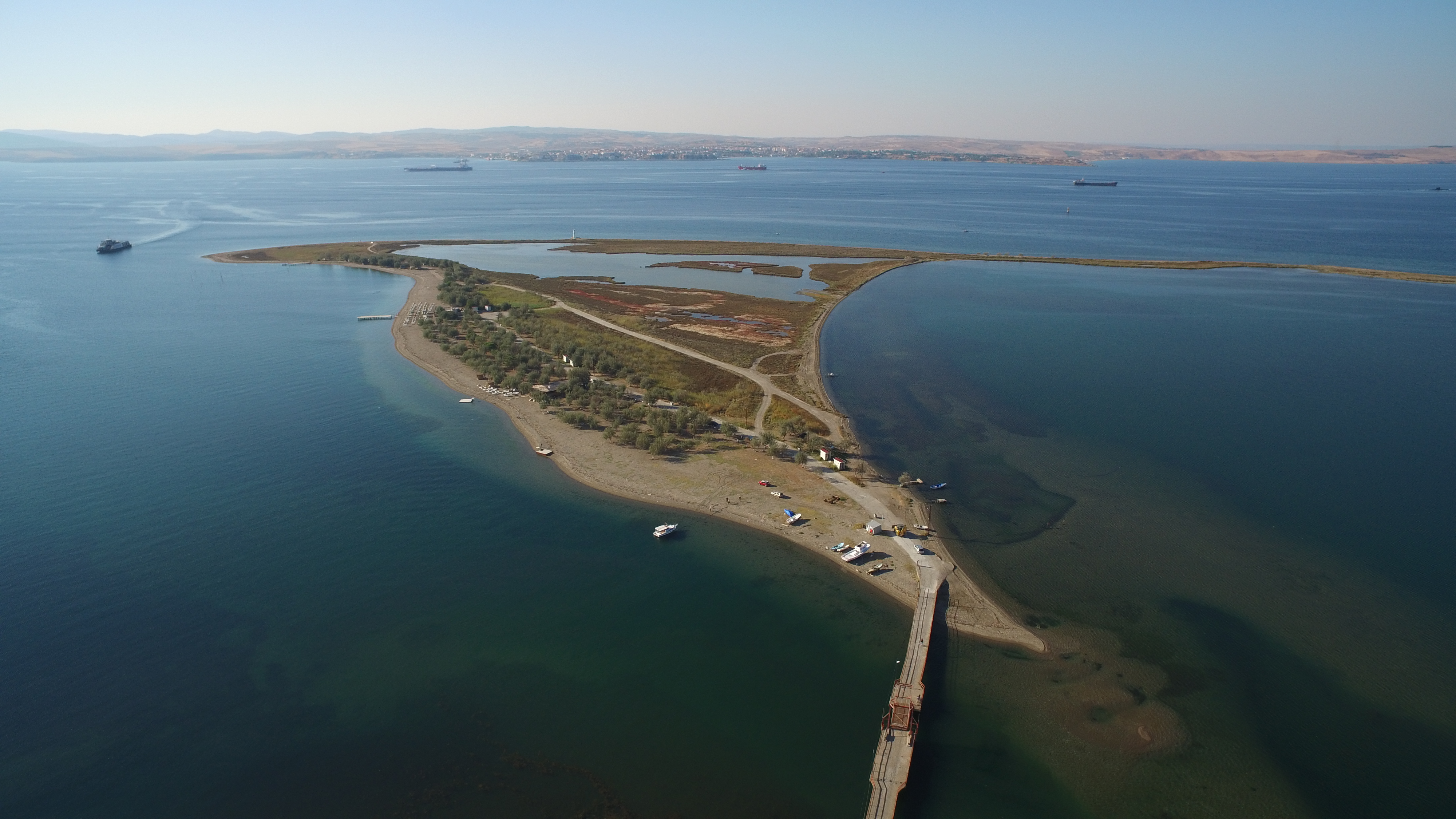 Çardak kum adası ve plaj